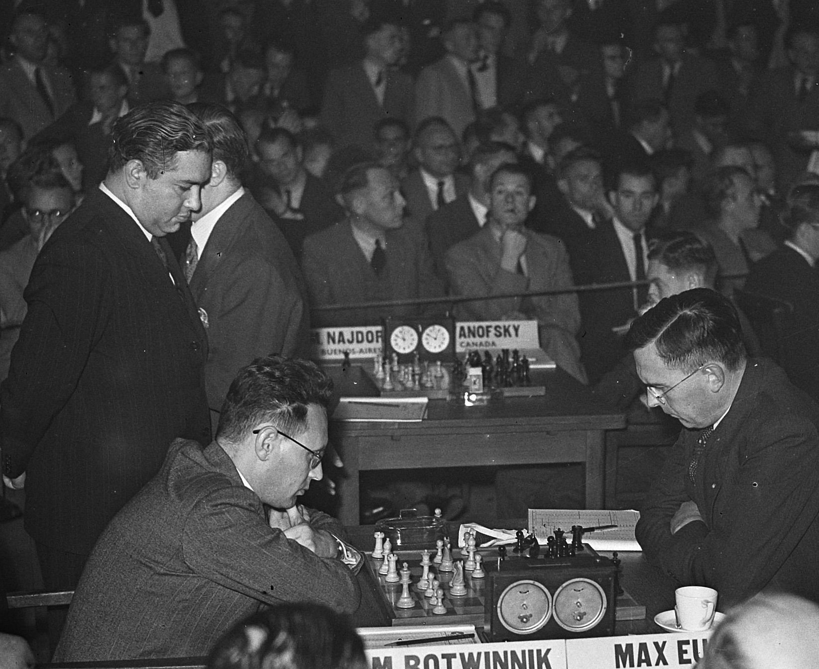 Staunton schaaktoernooi in Groningen (Hotel Frigge); Euwe (rechts) tegen Botwinnik. 24 augustus 1946. Toekijkend wrsch Carlos Guimard.